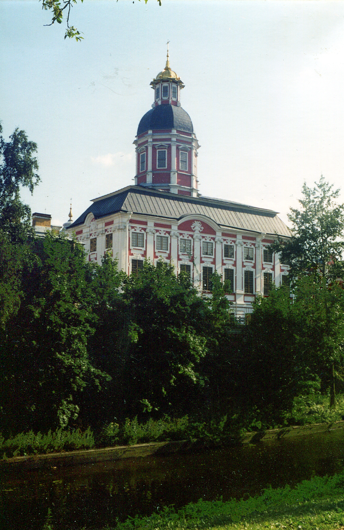 Конрад Кристоф (1670 - ?) Церковь Благовещения Пресвятой Богородиц.Лавра